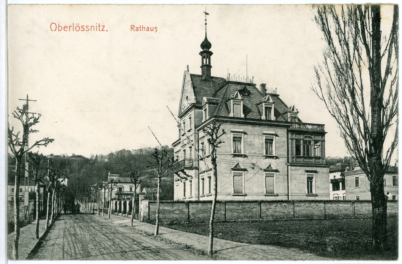 Oberlößnitz; Rathaus This postcard is from publisher Brück & Sohn in Meißen ( postcard has a unique number 02155 and is available in a higher resolution at the publisher. This images was uploaded in a cooperation project between Wikipedians and the publisher.